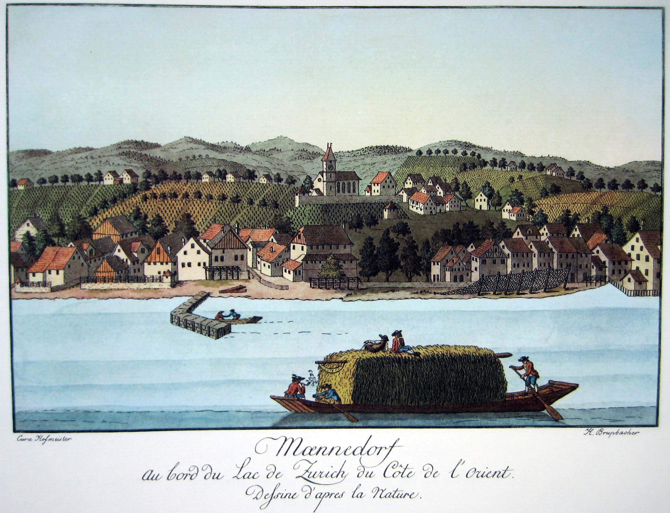 Männedorf 1794